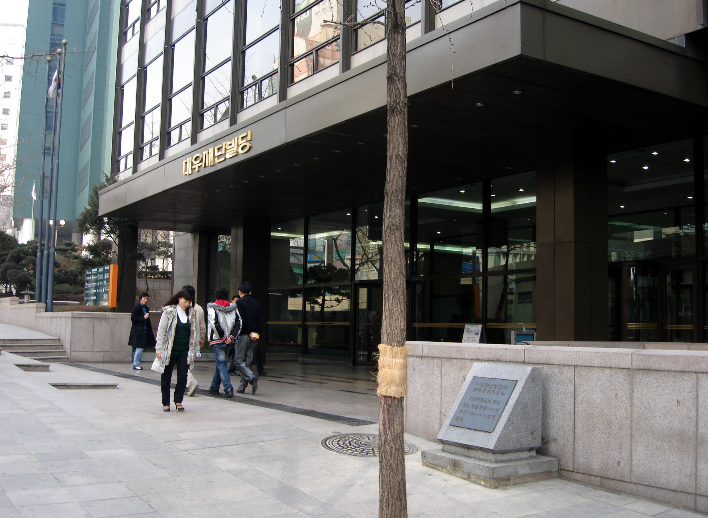 서울특별시 중구에 있는 대우재단빌딩. 한음 이덕형의 옛 집터로 오른쪽 하단에 표지석이 보인다.